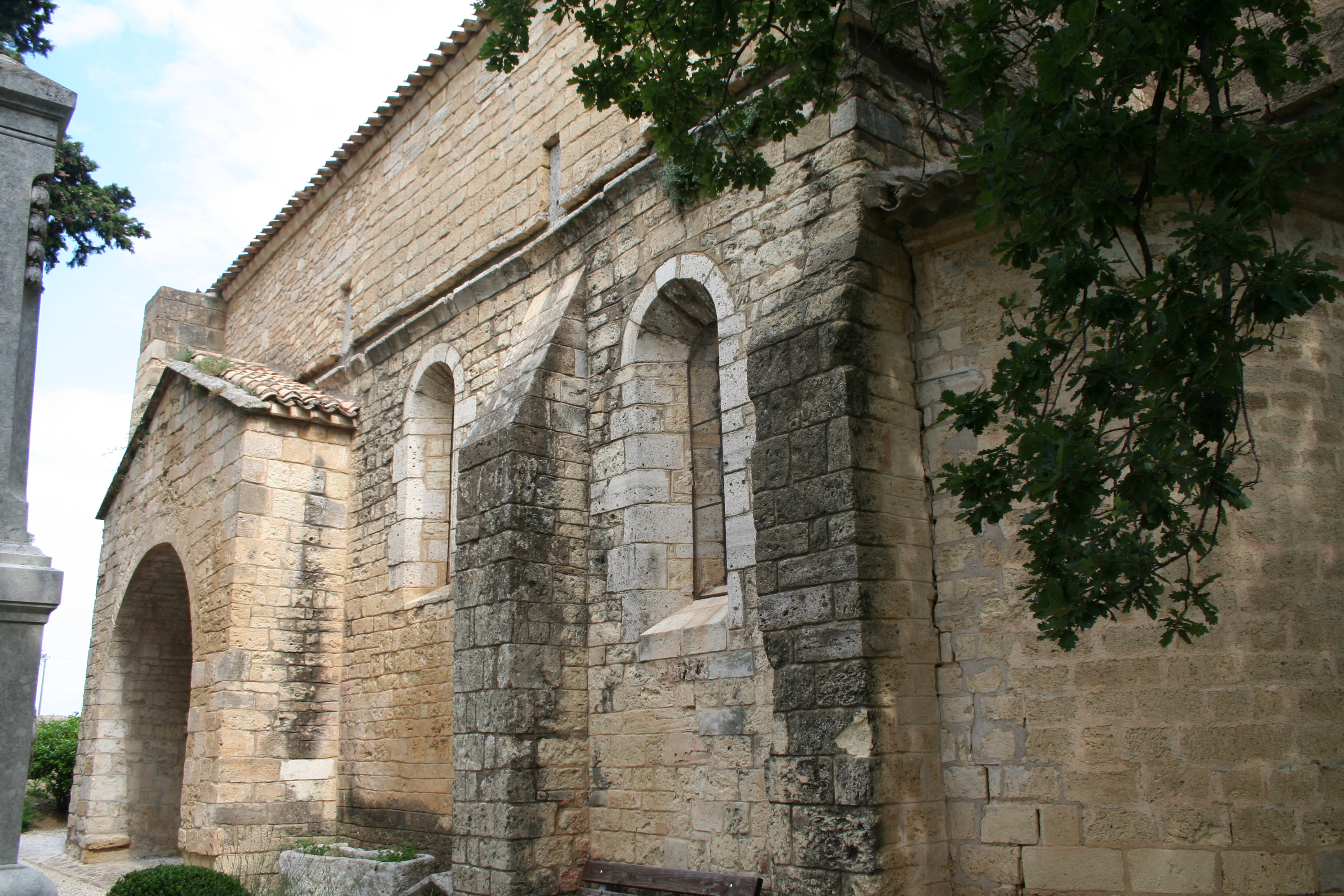 Espondeilhan (Hérault) - Mur méridional de Notre-Dame des Pins.